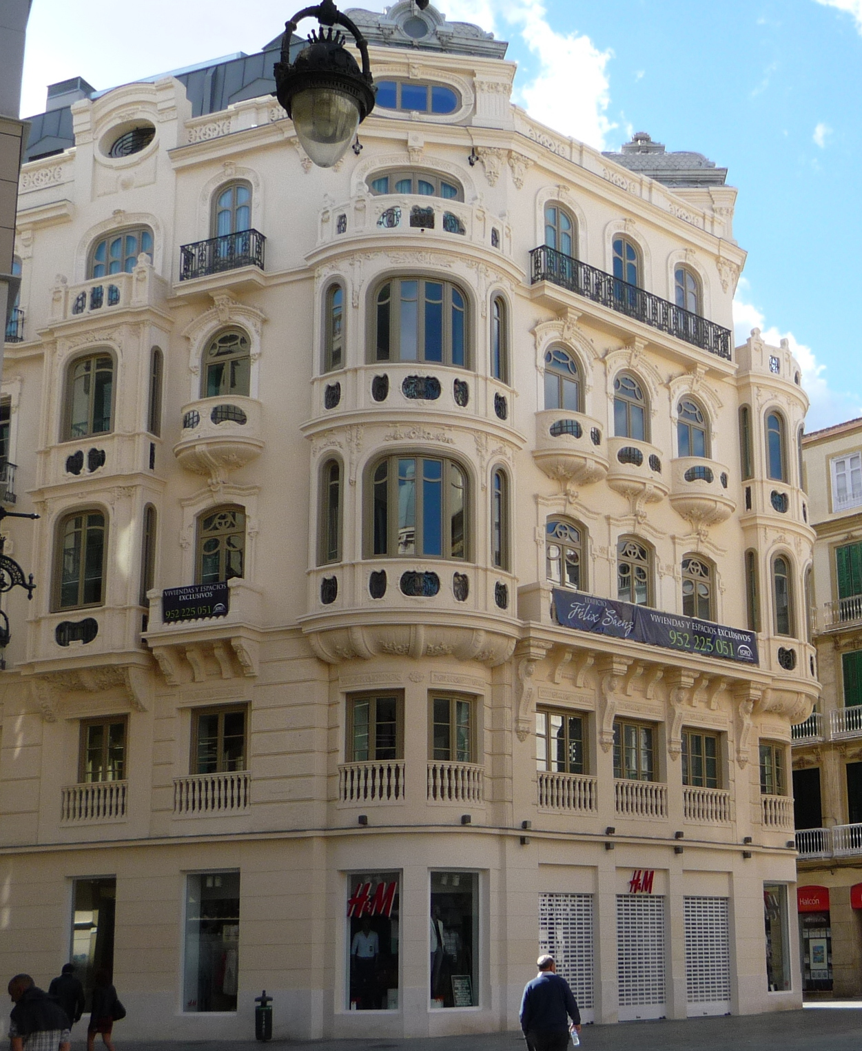 Former department store Félix Sáenz